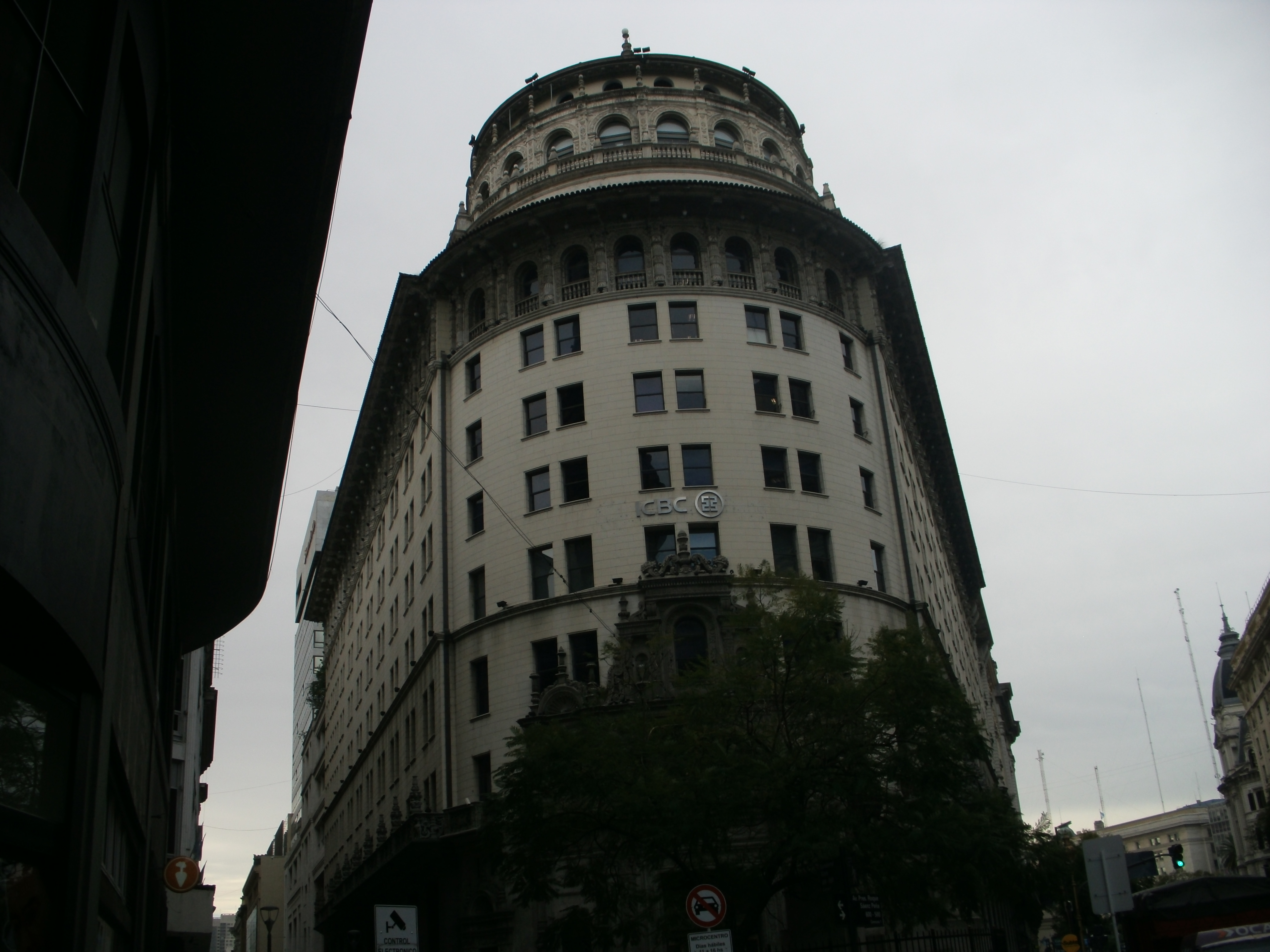 desarrolo y remate del icbc